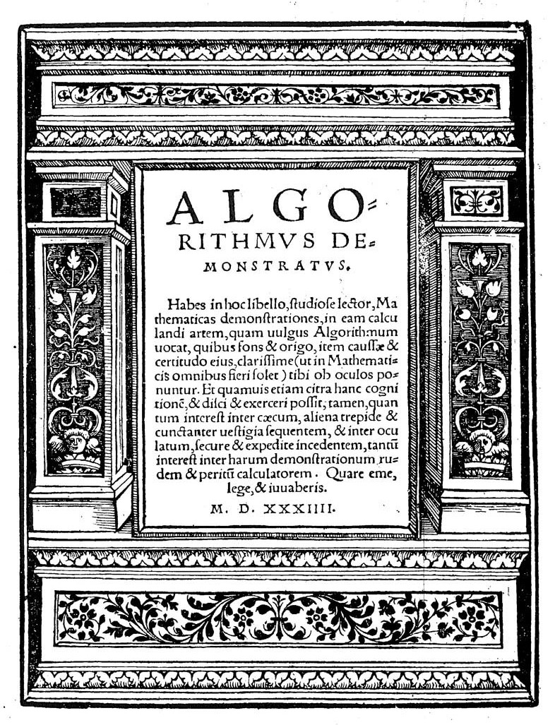 Algorithmus demonstratus. Habes in hoc libello, ... mathematicas demonstrationes, in eam calculandi artem, quam uulgus algorithmum uocat, quibus fons & origo, item caussae & certitudo eius, … tibi ob oculos ponuntur. …. - [S.l. : s.n.], 1534 (Norimbergae : apud Io. Petreium). - [32] c. ; 4º .